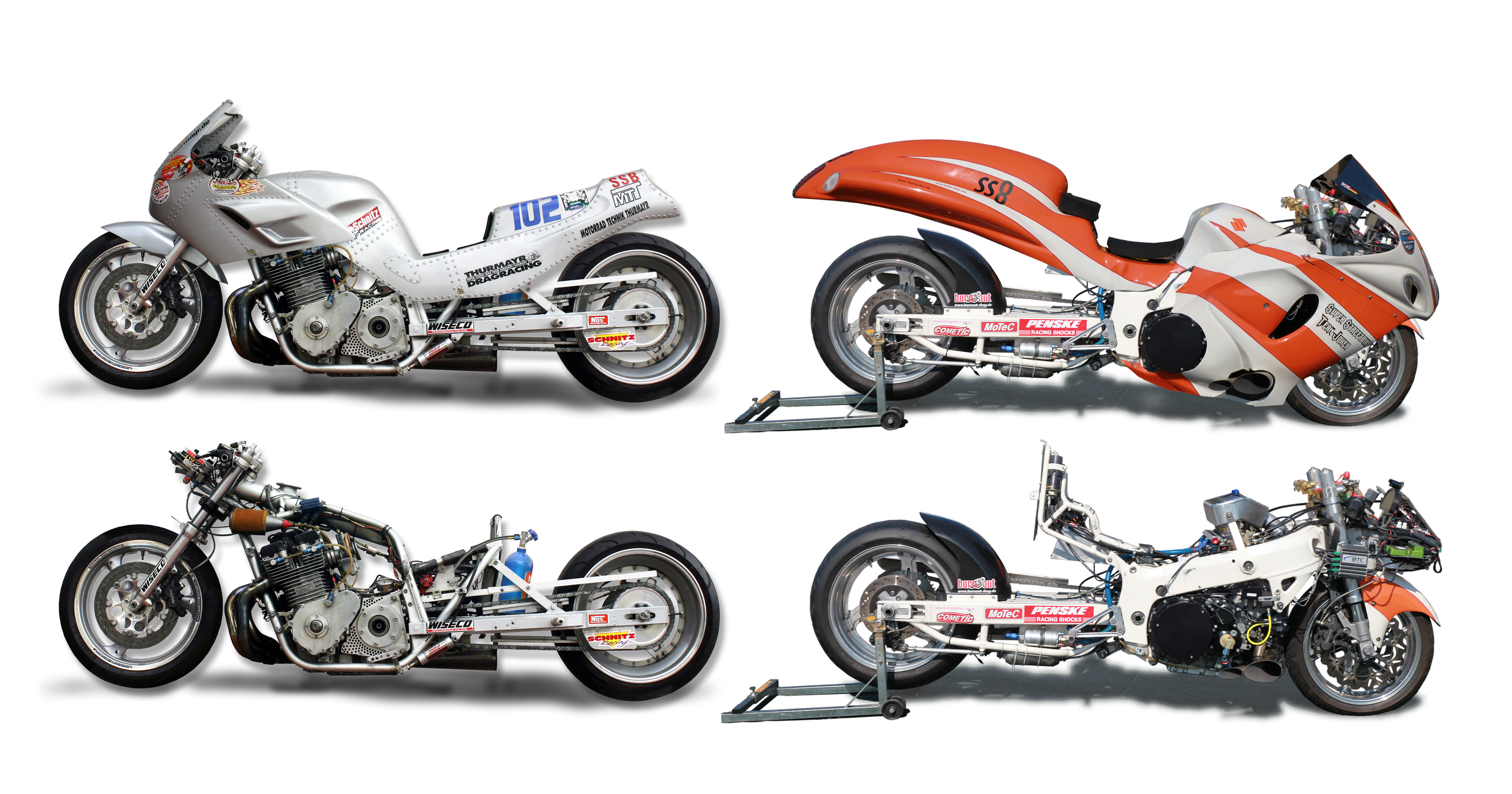 Technische Entwicklung bei Drag Bikes der Klasse Super Street Bike SSB. Links Lachgasunterstützes Bike (1998). Rechts Bike mit Turboaufladung (2016)